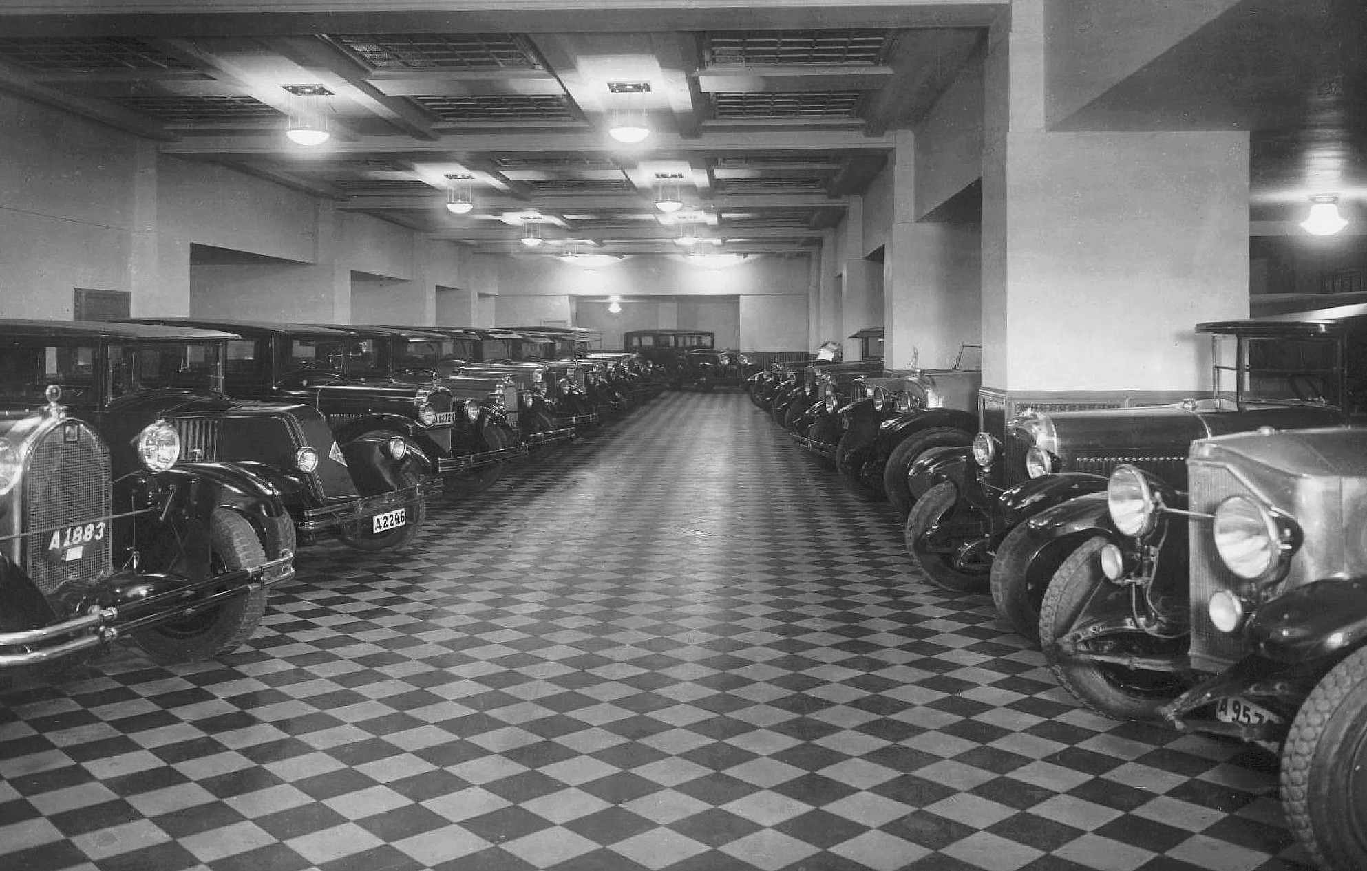 Nybrogatan 11: AB Bilutställningen som sålde begagnade bilar i Auktionshallens lokaler.